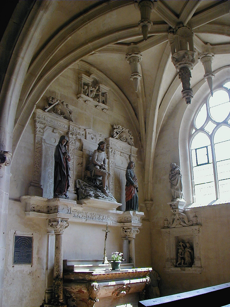 Vignory - Eglise Saint-Etienne - Chapelle Renaissance (1541) du bas-côté Sud, 3 statues classées M.H. Christ aux liens, Vierge-Marie, St Jean.